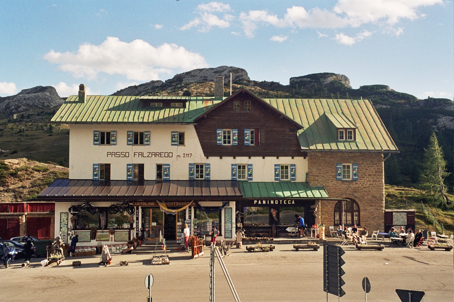 Refugio on Falzarego Pass